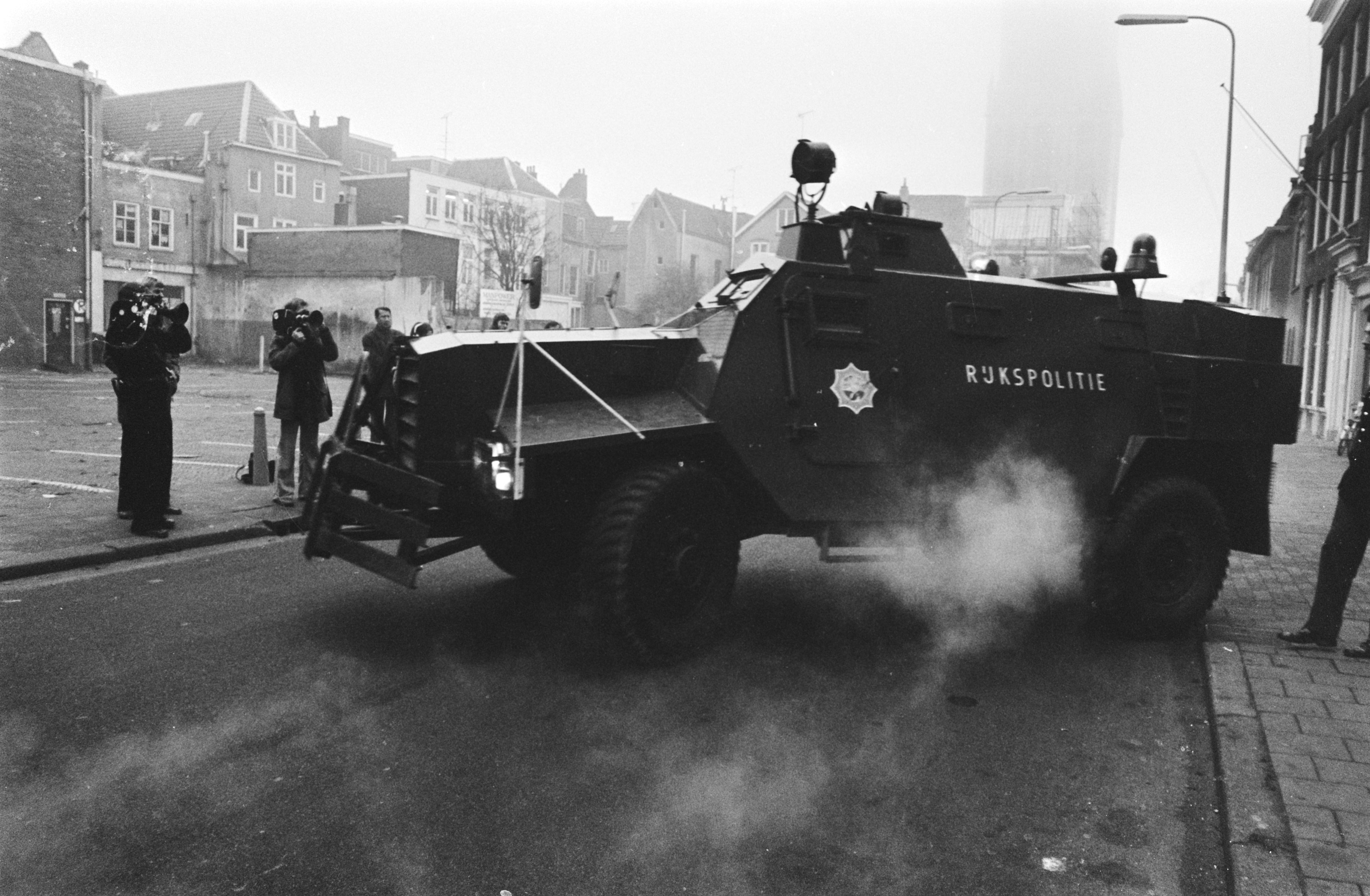 Collectie / Archief : Fotocollectie Anefo Reportage / Serie : [ onbekend ] Beschrijving : Berechting RAF-lid Kurt Folkerts in Utrecht; het Sankey pantservoertuig van de Rijkspolitie waarin Folkerts wordt vervoerd Datum : 20 december 1977 Locatie : Utrecht Trefwoorden : processen, rechtbanken, rechtszaken, voertuigen Persoonsnaam : Folkerts, Kurt Instellingsnaam : RAF, Sankey Fotograaf : Bogaerts, Rob / Anefo Auteursrechthebbende : Nationaal Archief Materiaalsoort : Negatief (zwart/wit) Nummer archiefinventaris : bekijk toegang 2.24.01.05 Bestanddeelnummer : 929-4926